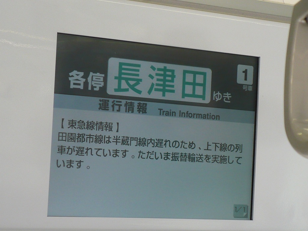 東急5000系車内